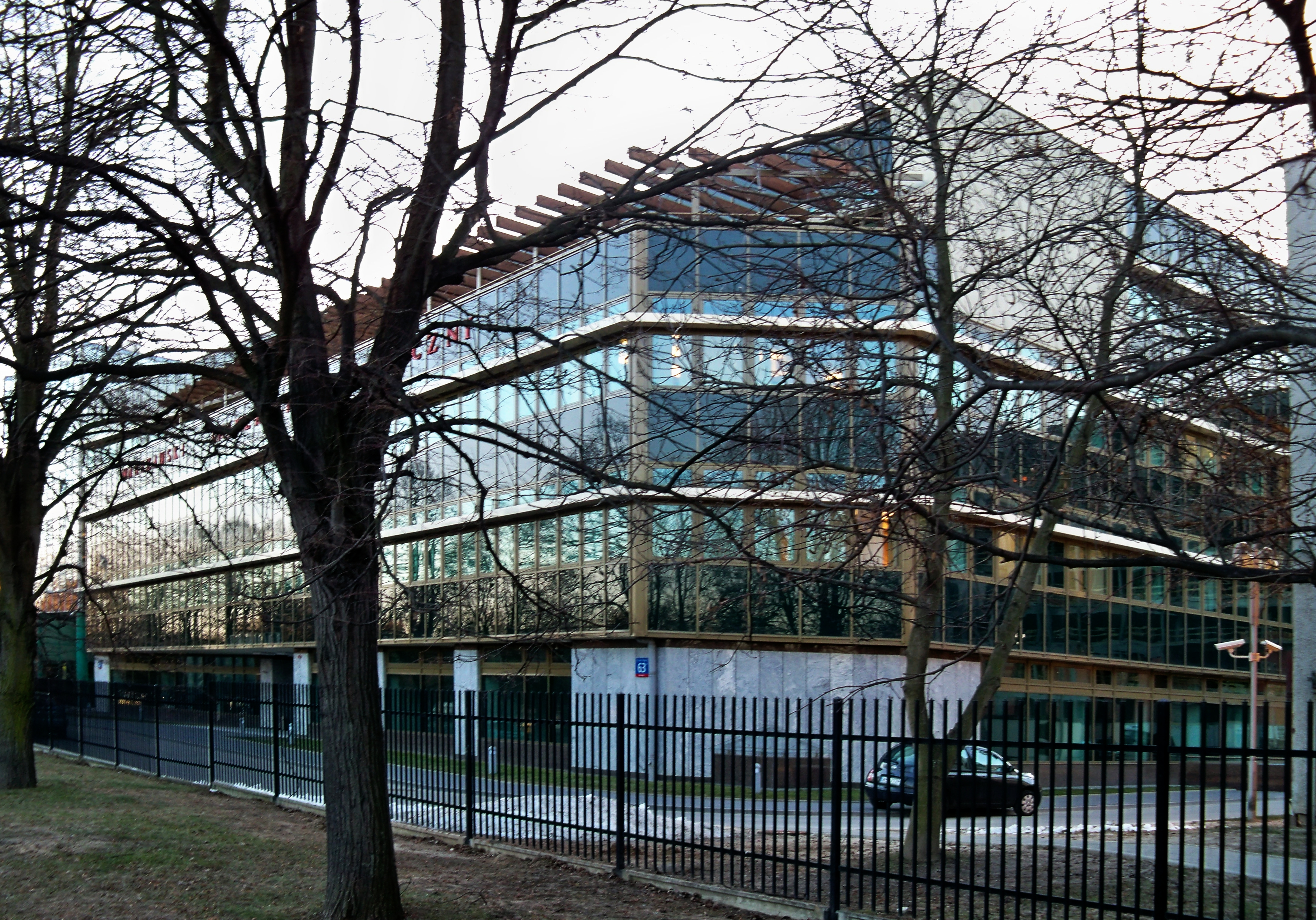 Centrum Biblioteczno-Informacyjne Warszawskiego Uniwersytetu Medycznego. Ul. Żwirki i Wigury 63.